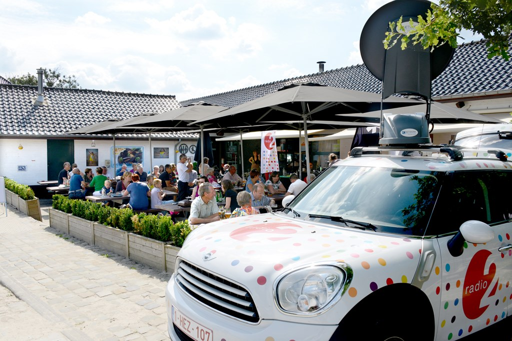 Radio 2 Vlaams-Brabant tijdens een live uitzending in provinciedomein in Het Vinne in Zoutleeuw.